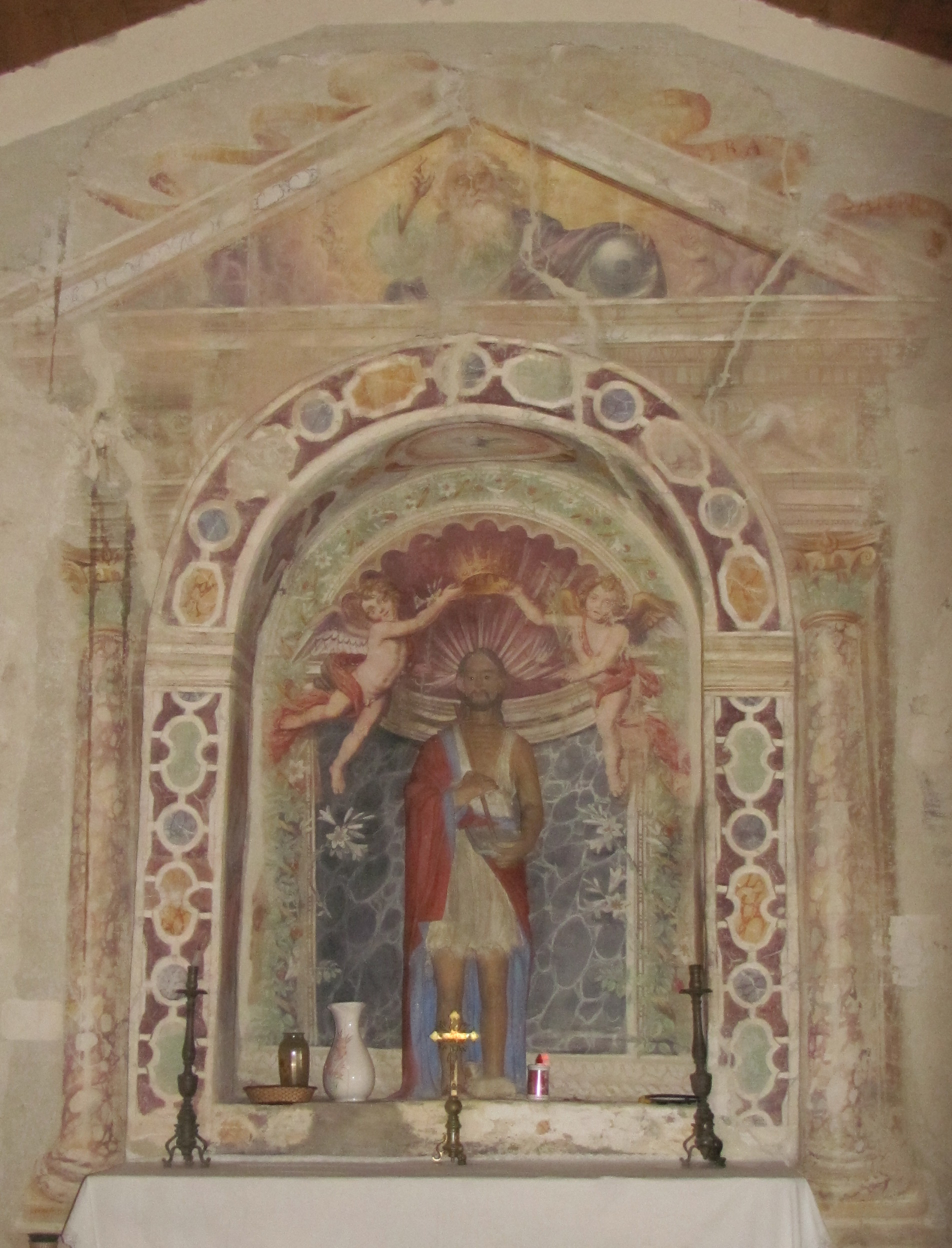 Fresques de la chapelle Saint-Jean à Satriano di Lucania en Italie.